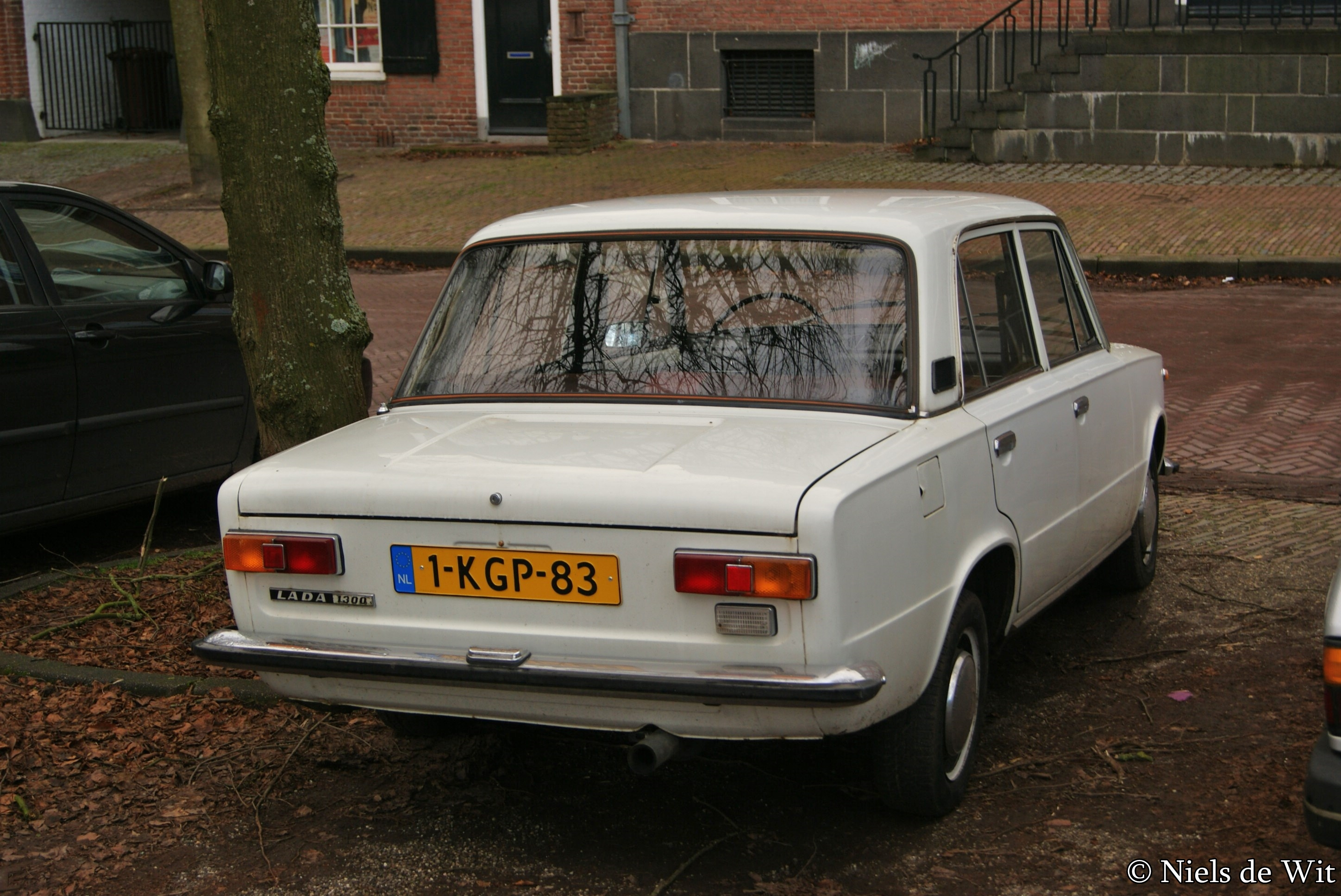 1-KGP-83